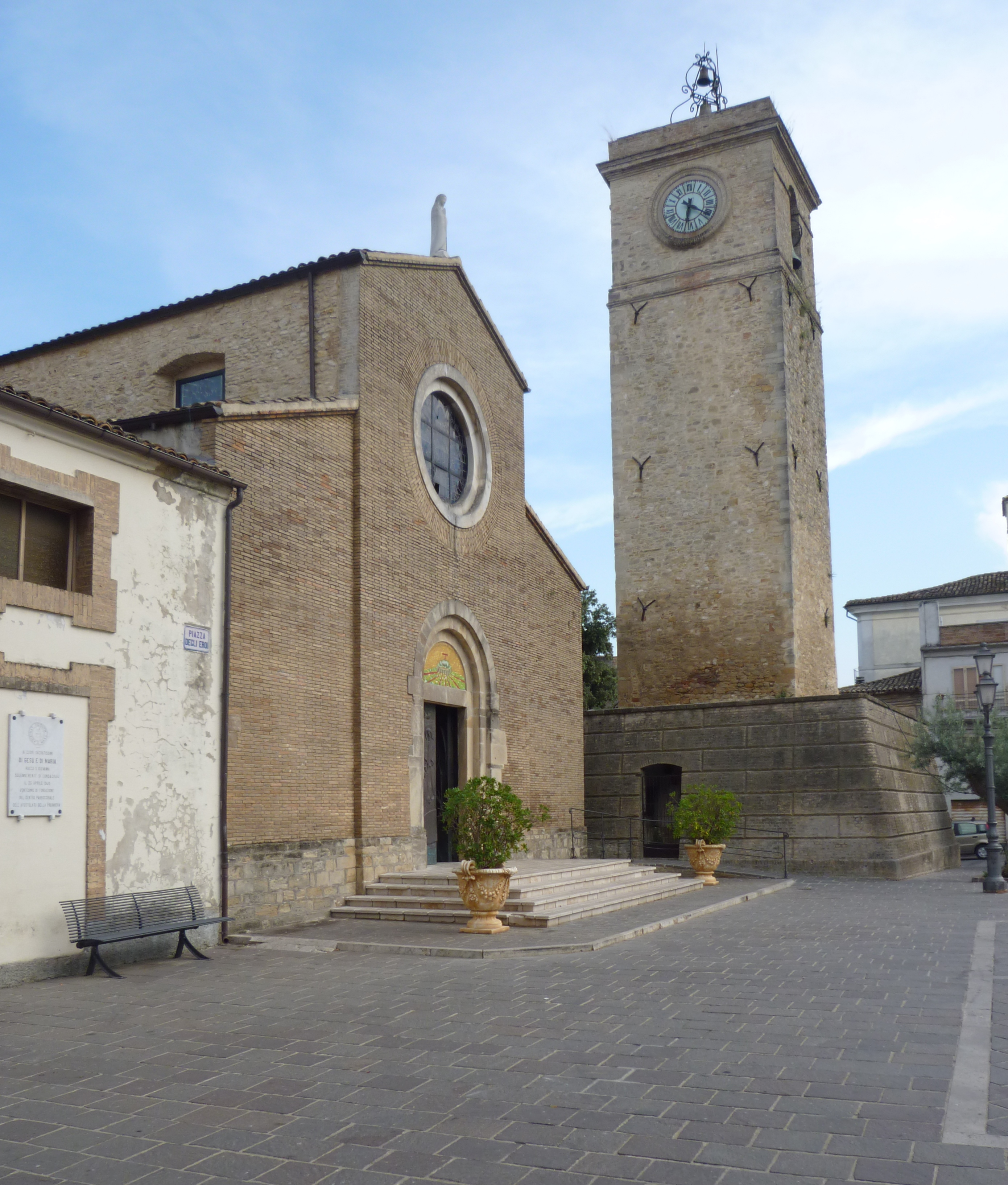 Chiesa di San Matteo. Rocca San Giovanni, Chieti.